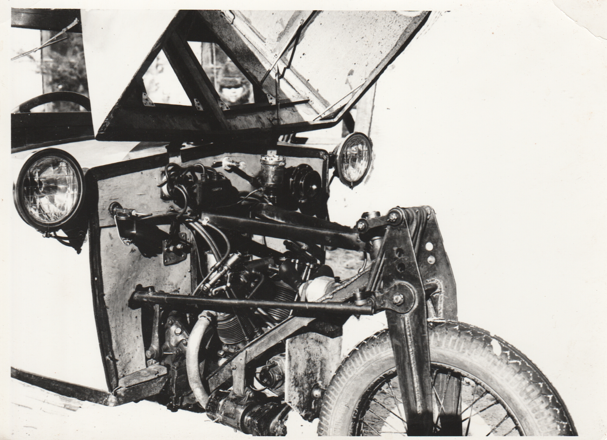 Двигатель Михлеона снимок 1937г